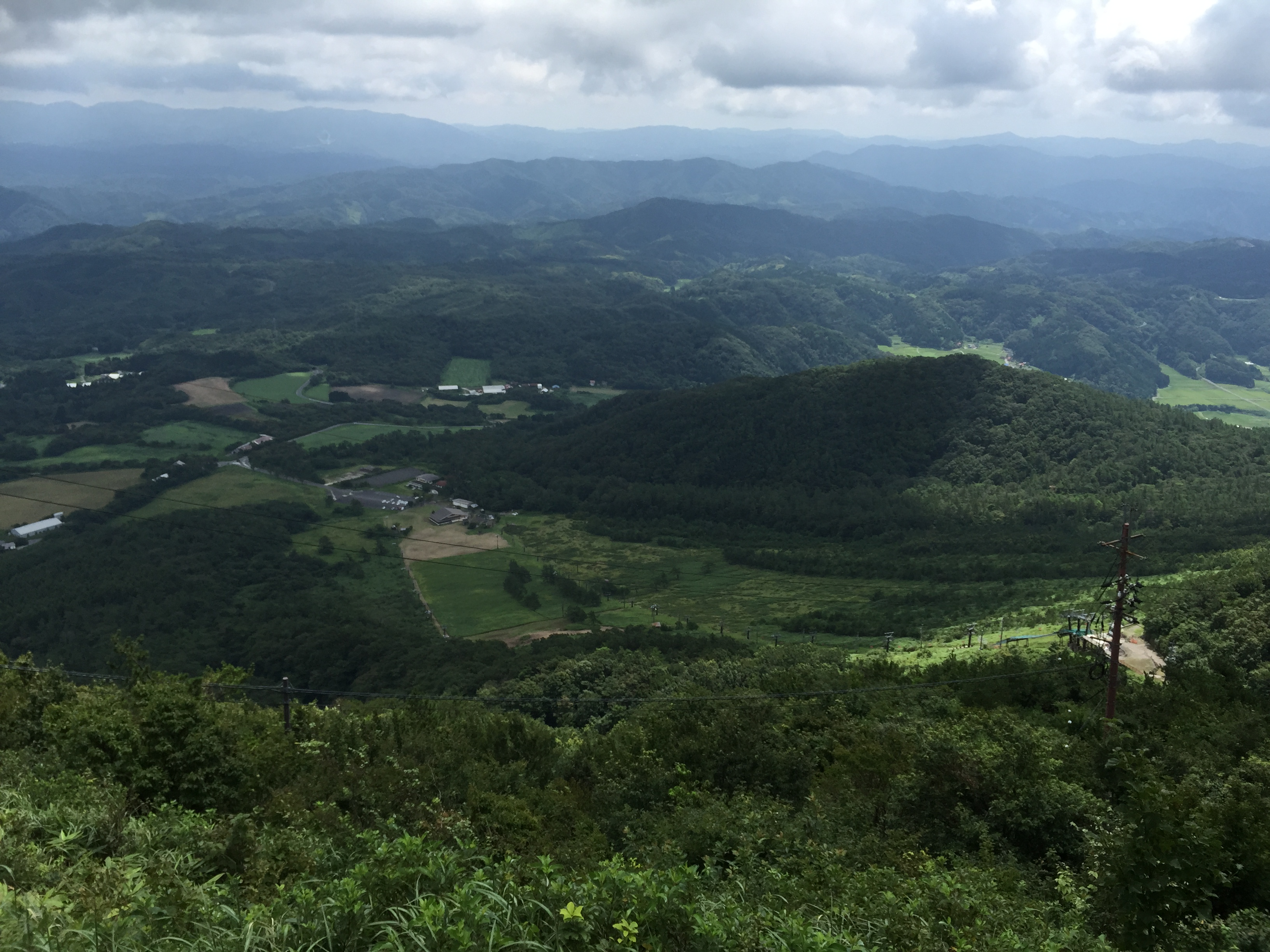 女三瓶山の山頂より西側を望む。写真中央やや左には、閉鎖した「さんべ観光スキー場」のレストラン棟が見える。写真右から中央には、「三瓶観光リフト」の乗り場と降り場が見える。